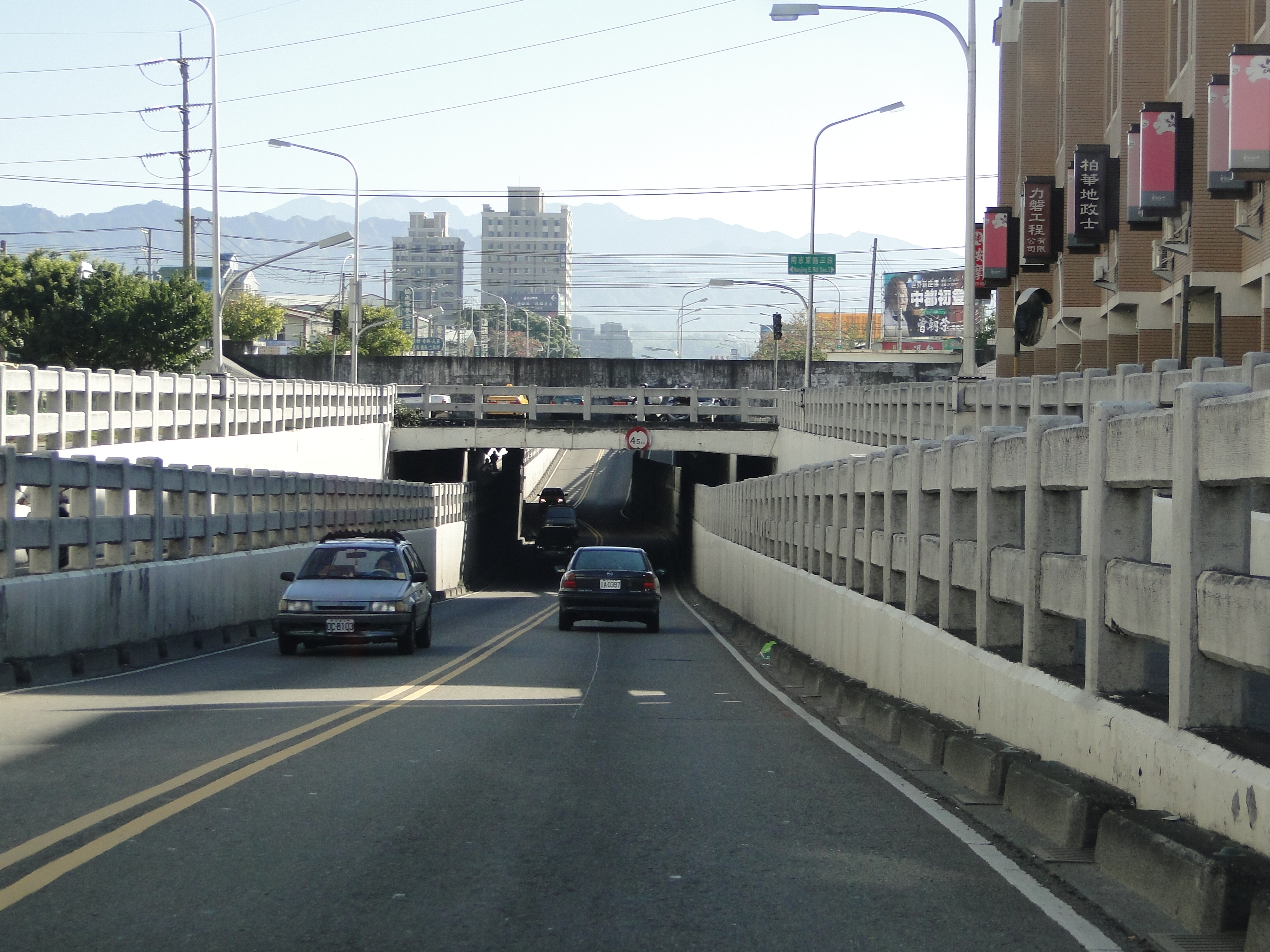 中文（台灣）: 台灣台中市太原路跨越台鐵山線的地下道。